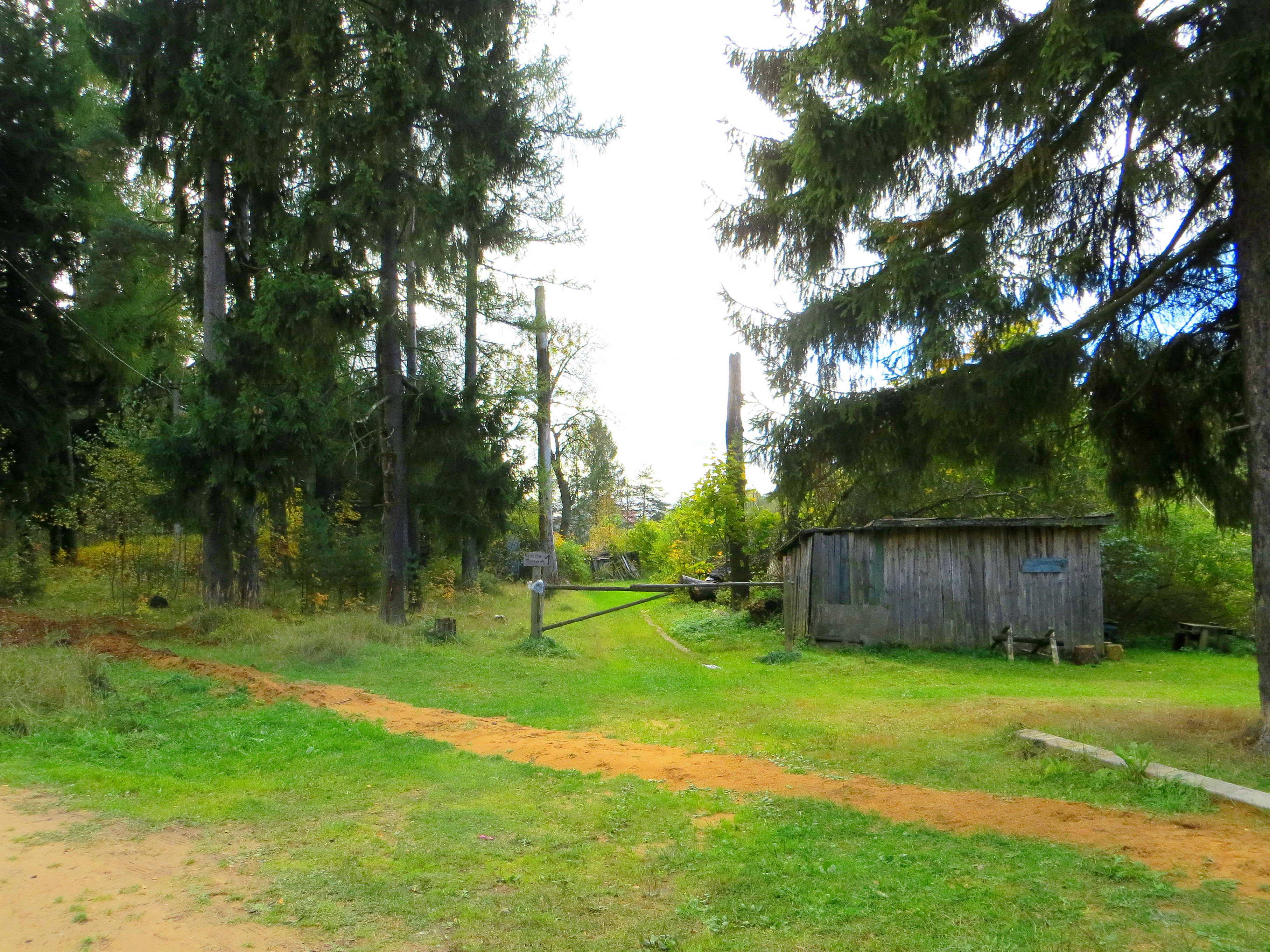 Всеволожск, микрорайон Красная Поляна, дом № 1.